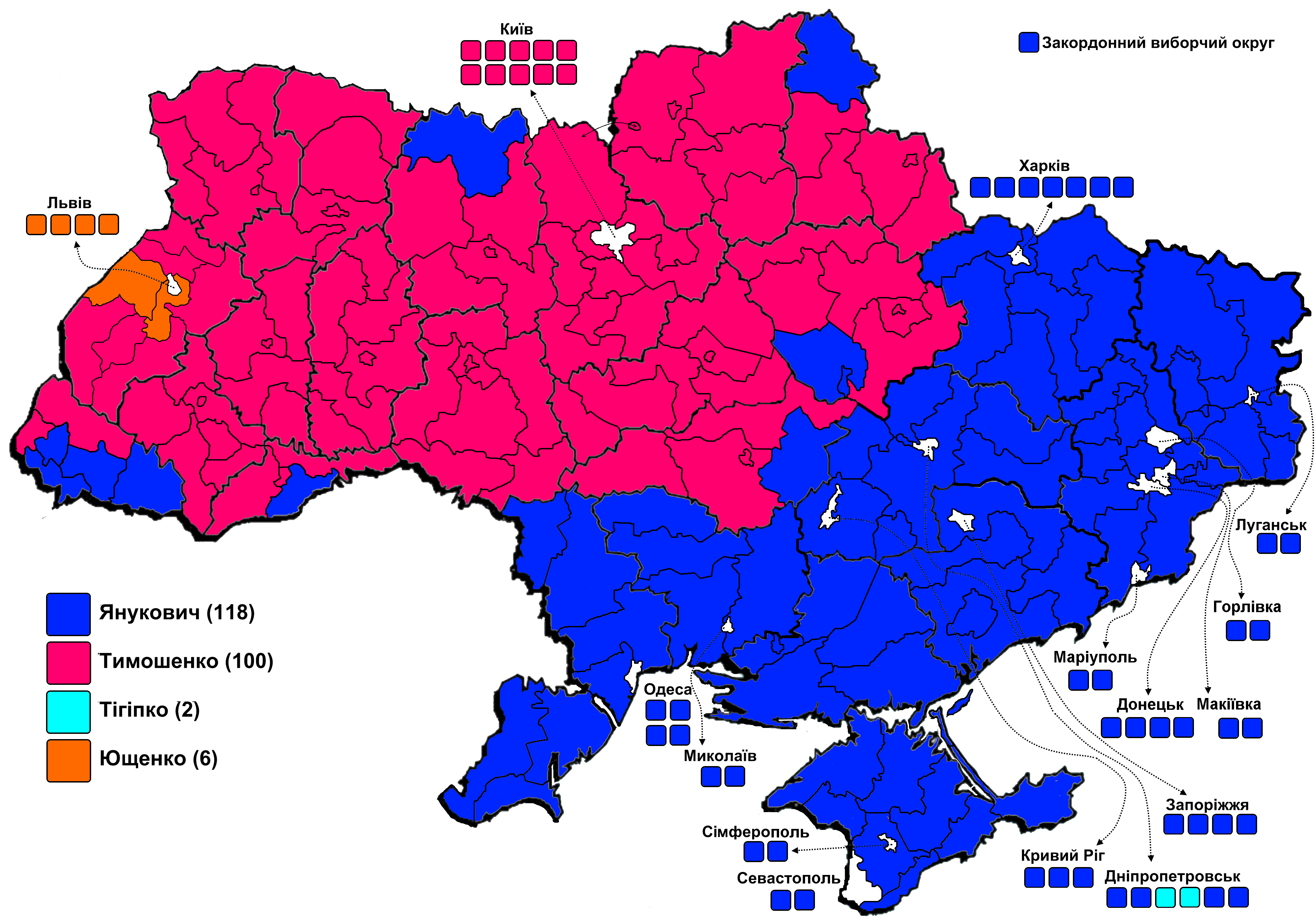 Переможці за округами. Перший тур.